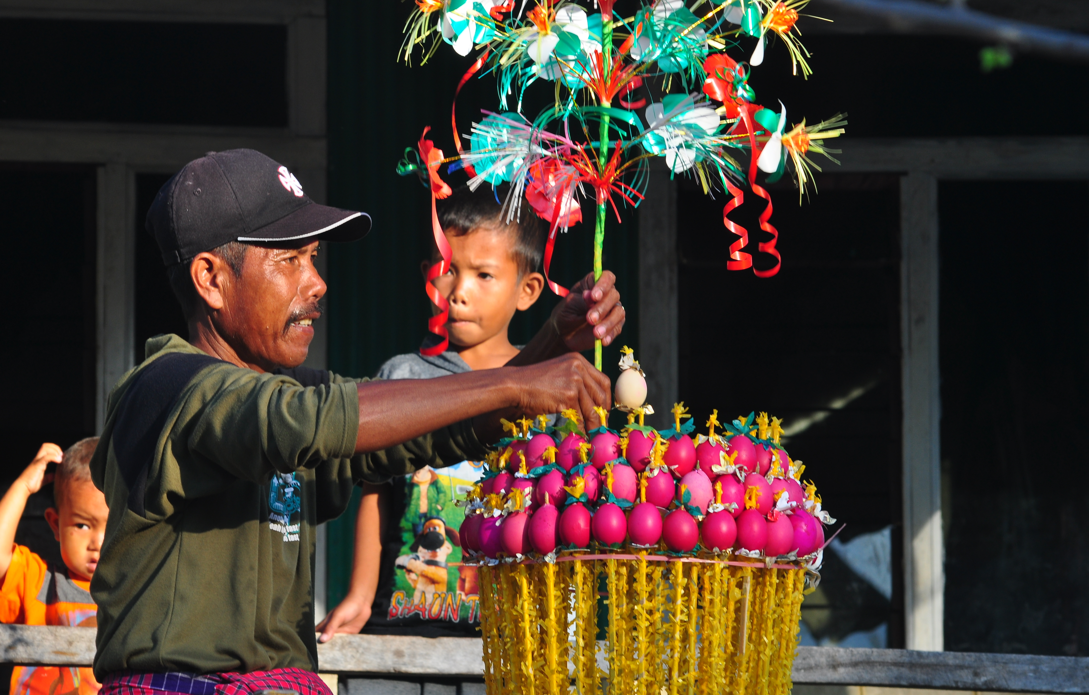 warga sedang mempersiapkan hiasan telur untuk acara maudu lompoa